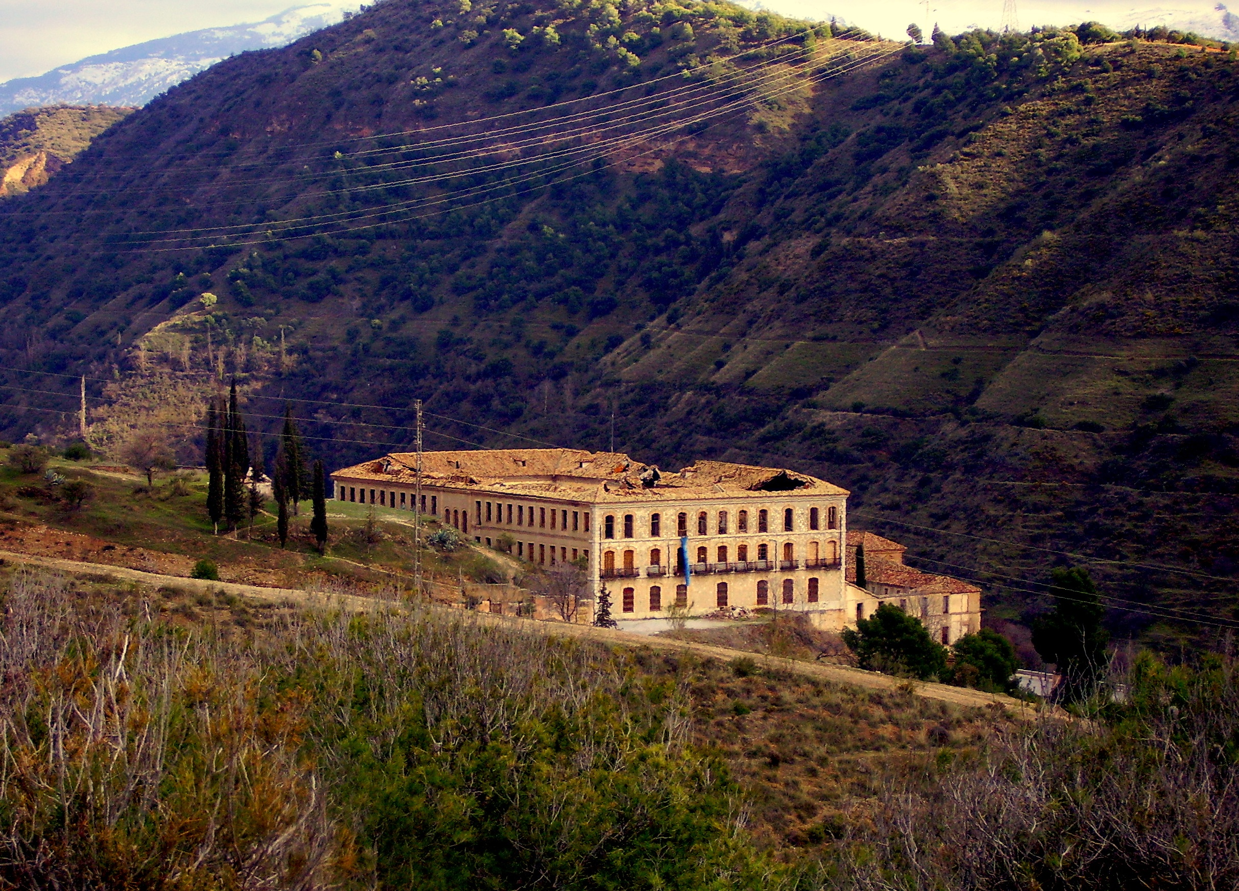 Sacromonte abbey